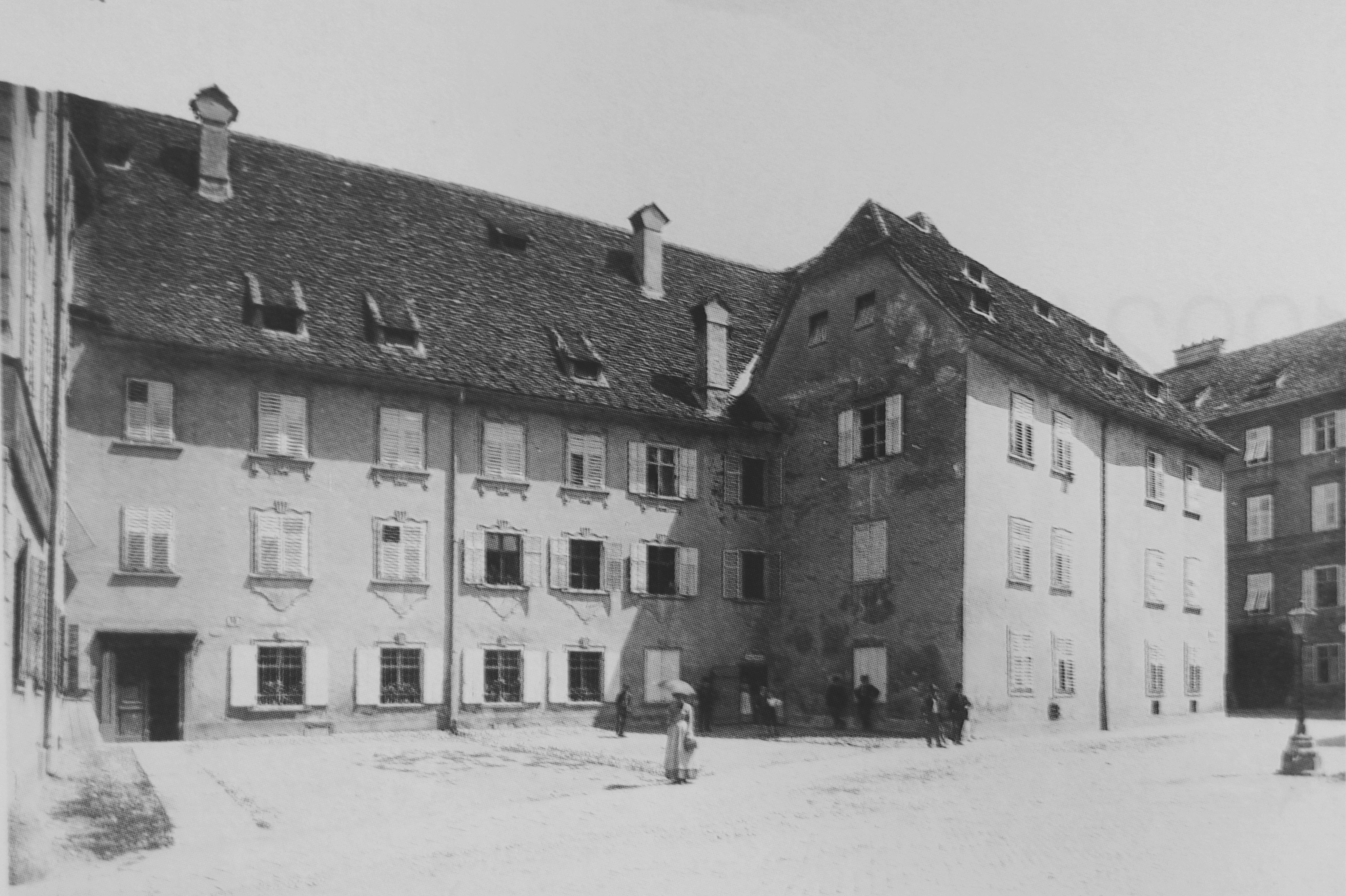 Bürgergasse 15, Graz, vor dem Neubau des 1. k. und k. Staatsgymnasiums Graz (1889); Aufnahme in Privatbesitz des Autors. Das Bild befindet sich auch in den Archivbeständen des Akademischen Gymnasiums Graz. Weiters wurde das Bild im Rahmen einer öffentlichen Ausstellung im Akademischen Gymnasium Graz ausgestellt und im Jahresbericht des Akademischen Gymnasiums Graz 1992/93, Seite 2, veröffentlicht.